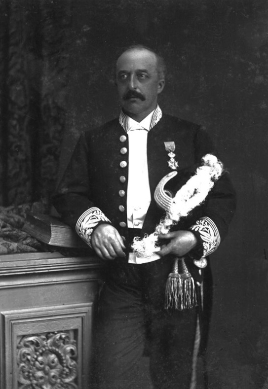 Jules Audent par Ghémar frères